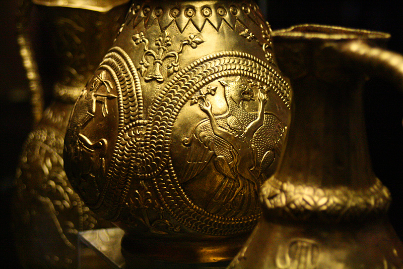 Детайл от украсата на кана № 2 от Наг Сент Миклошкото златно съкровище